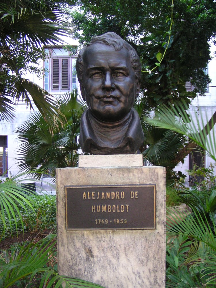 Humboldt-Büste auf dem Campus der Universität von Havanna/ Cuba